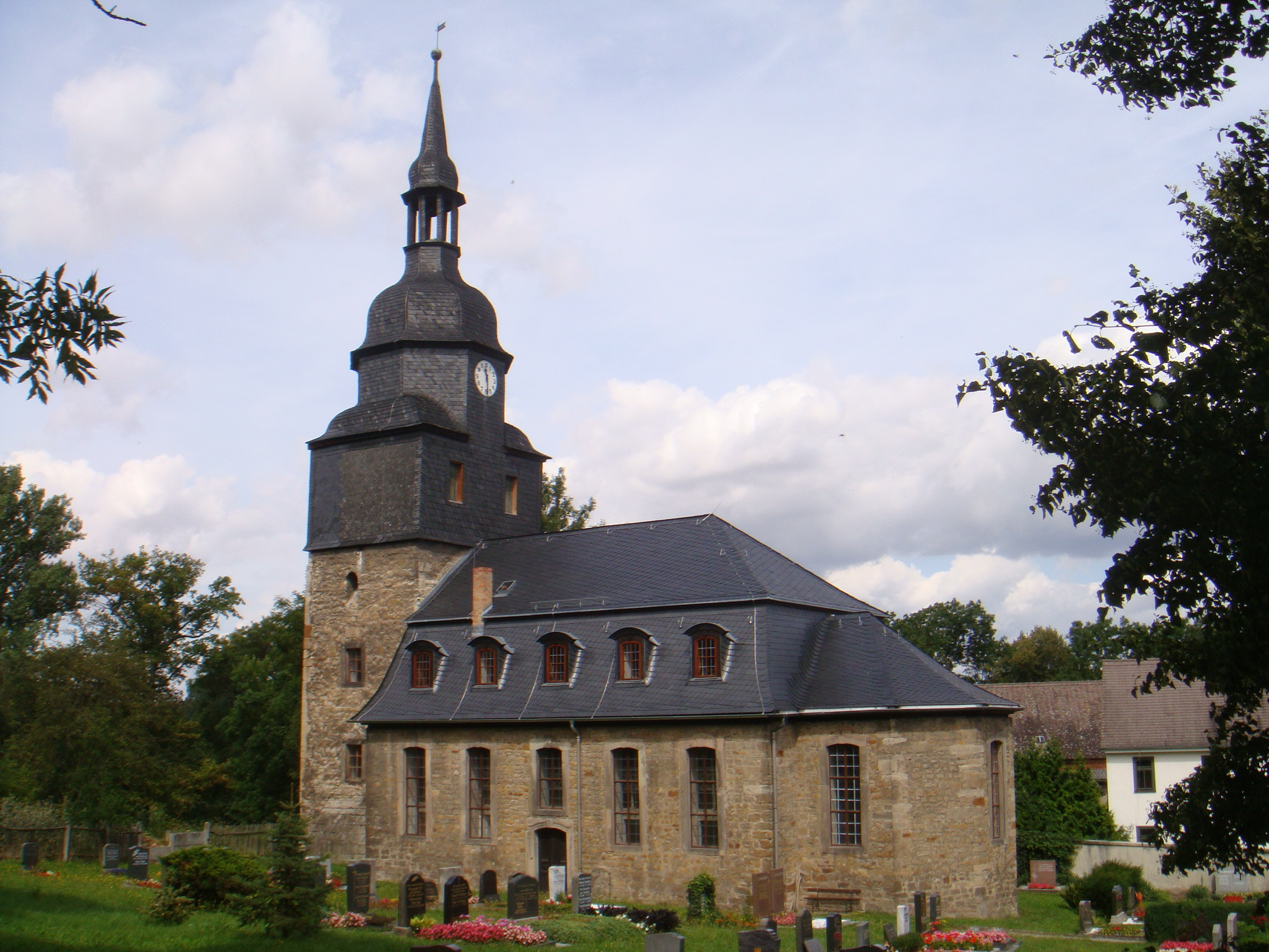 Kirchenansicht